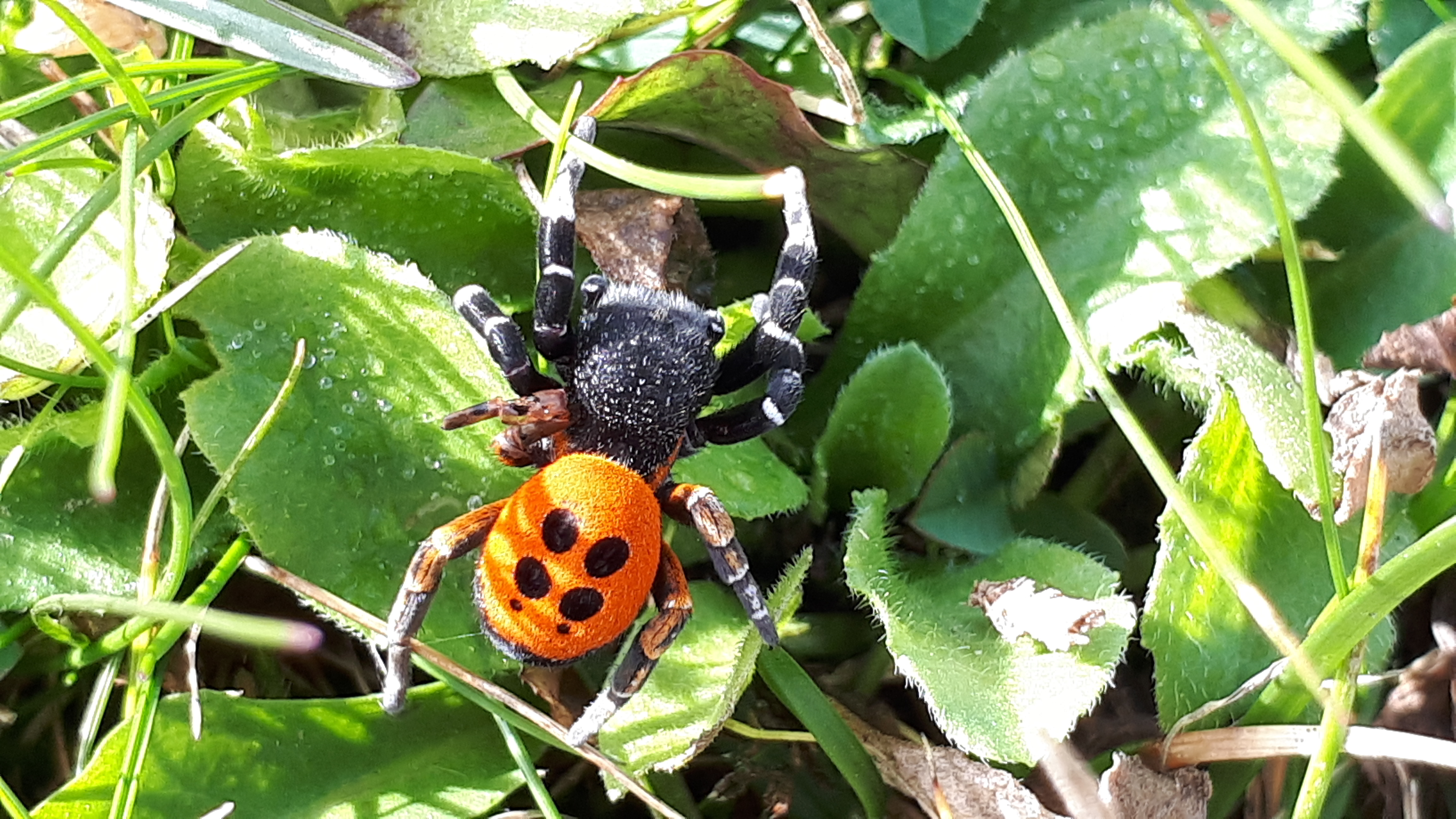 Araña moteada saltadora. Iberica